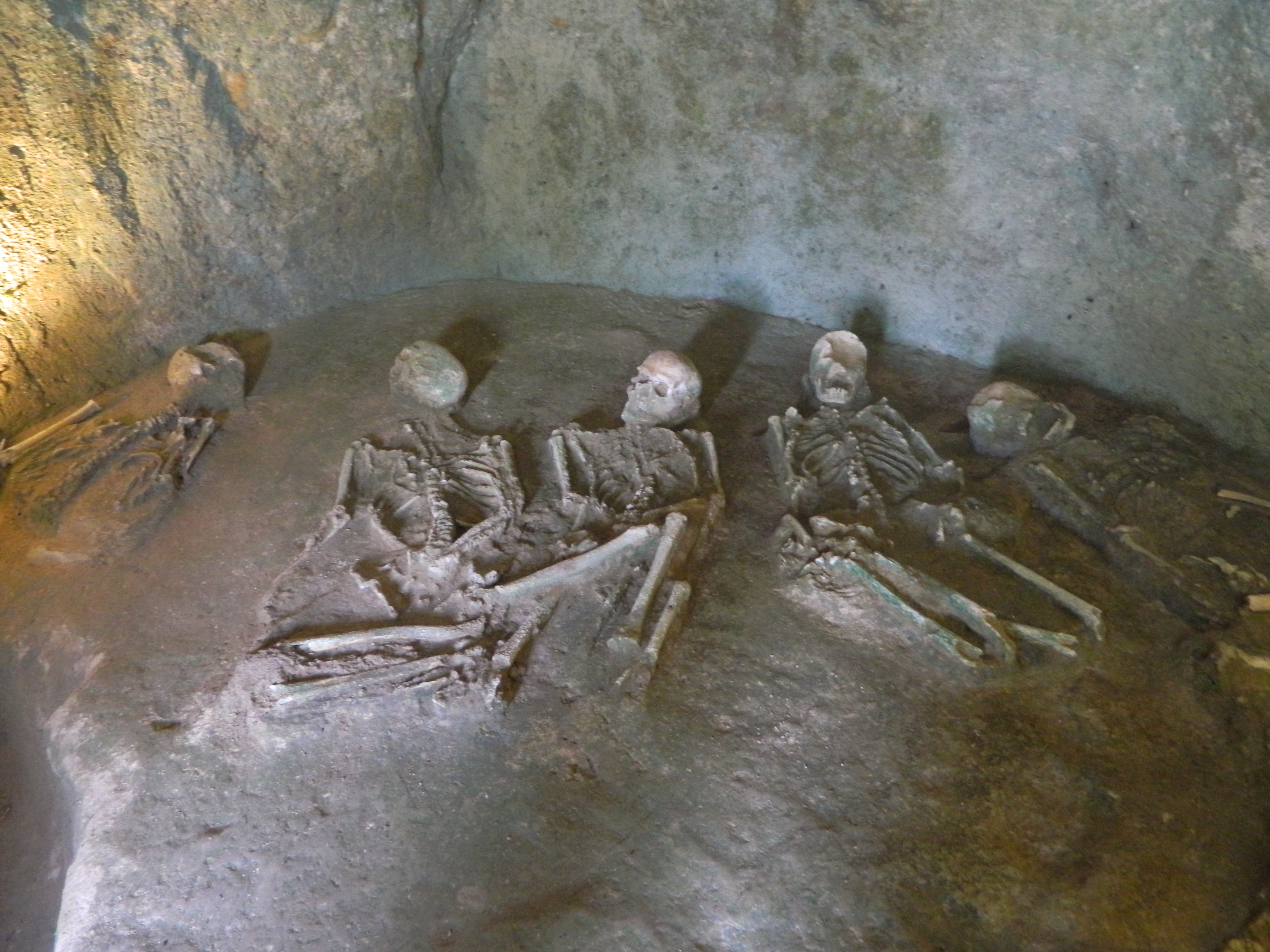 «Βούντενη»